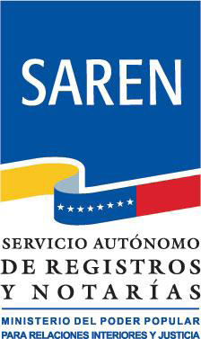 Este es el logotipo del Servicio Autónomo de Registros y Notarías